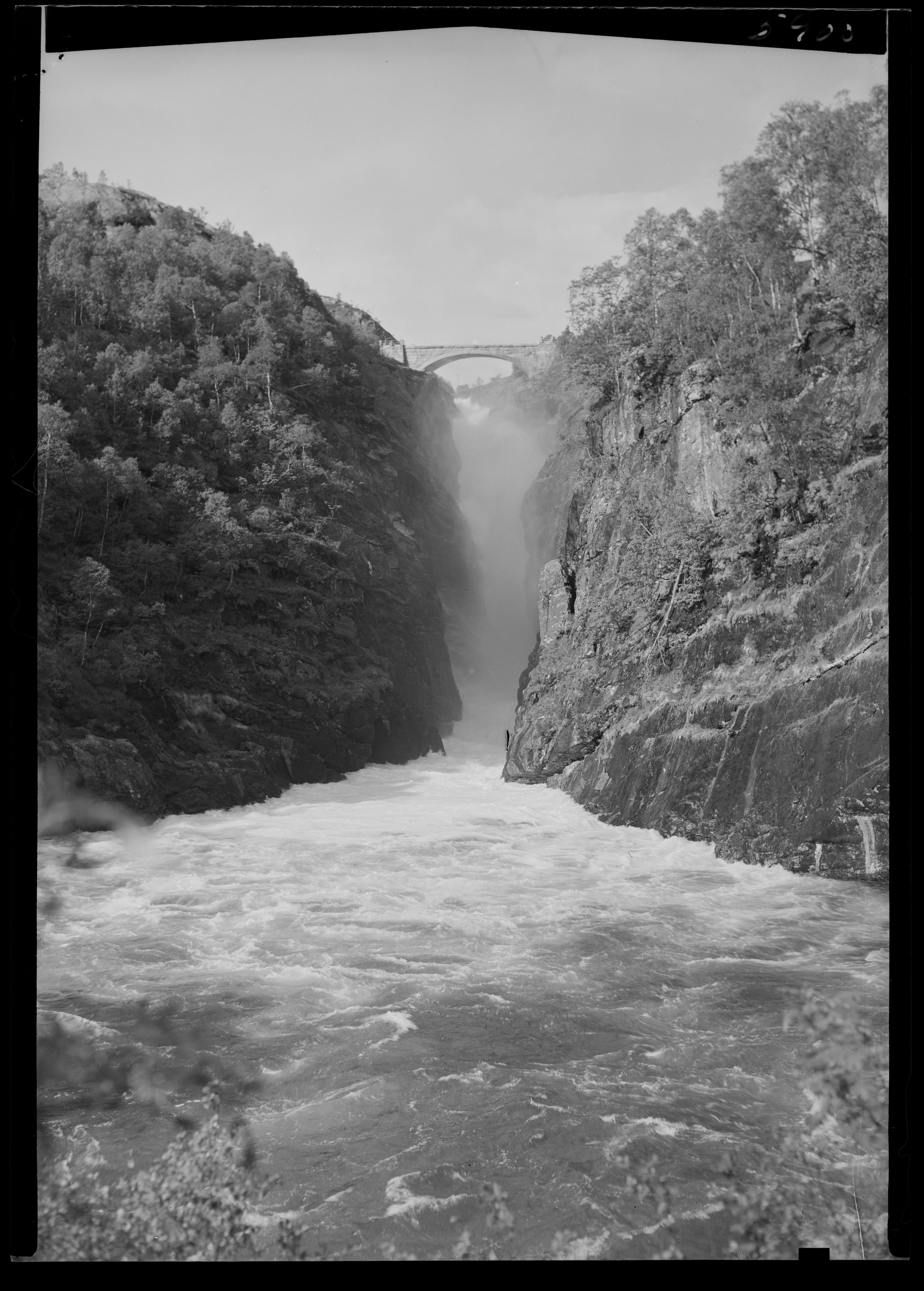 Bildet er hentet fra Nasjonalbibliotekets bildesamling. Anmerkninger til bildet var: Fotograf:Ukjent Dorgefoss, Sirdal, Vest Agder